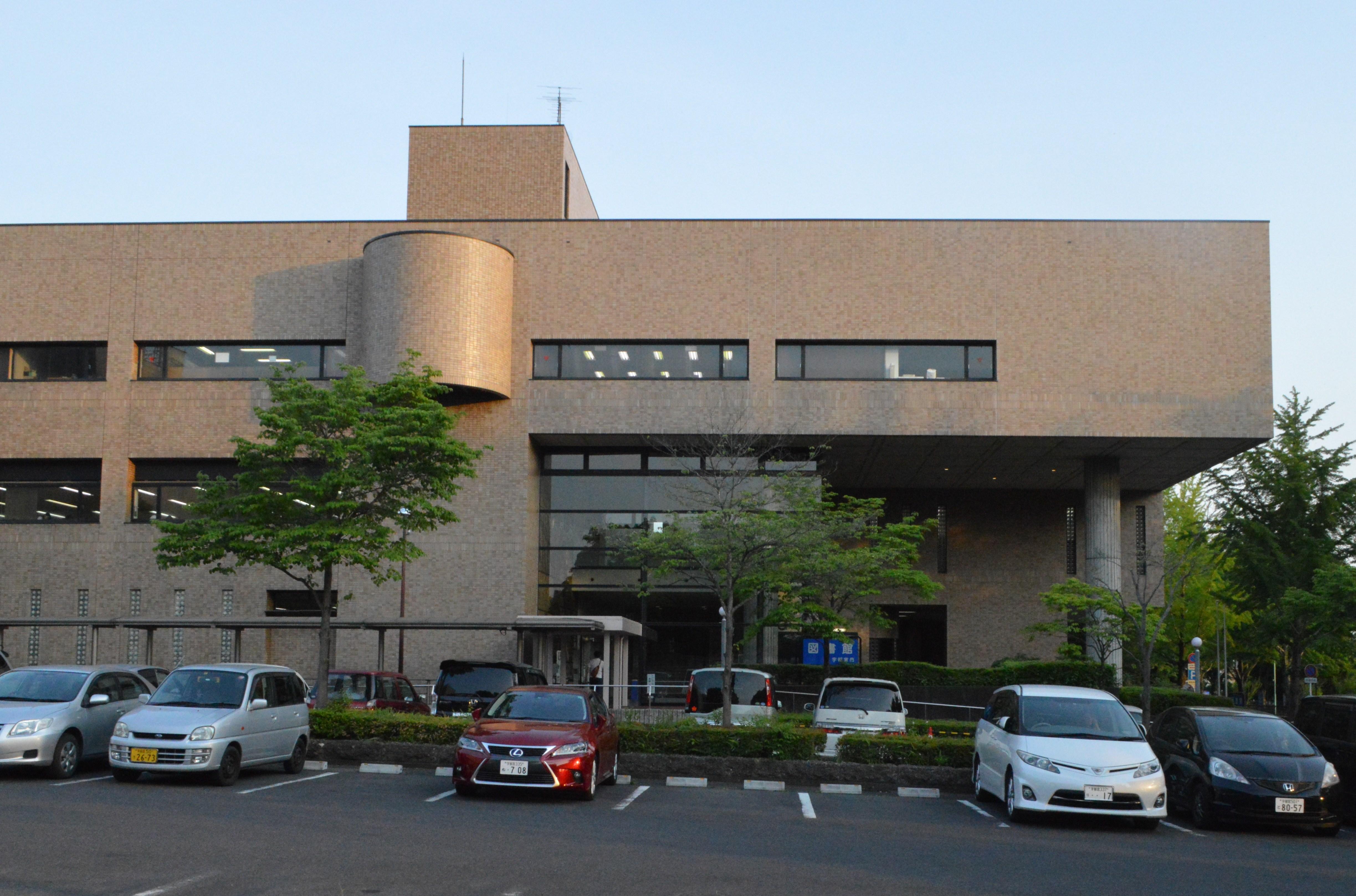 宇都宮市立図書館の本館である宇都宮市立中央図書館。